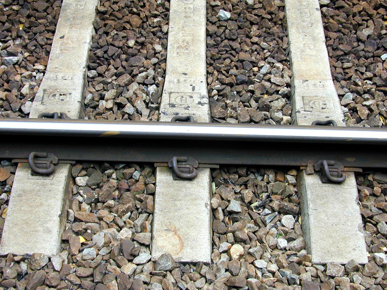 Dwarsliggers, detail van bevestiging rails; België.